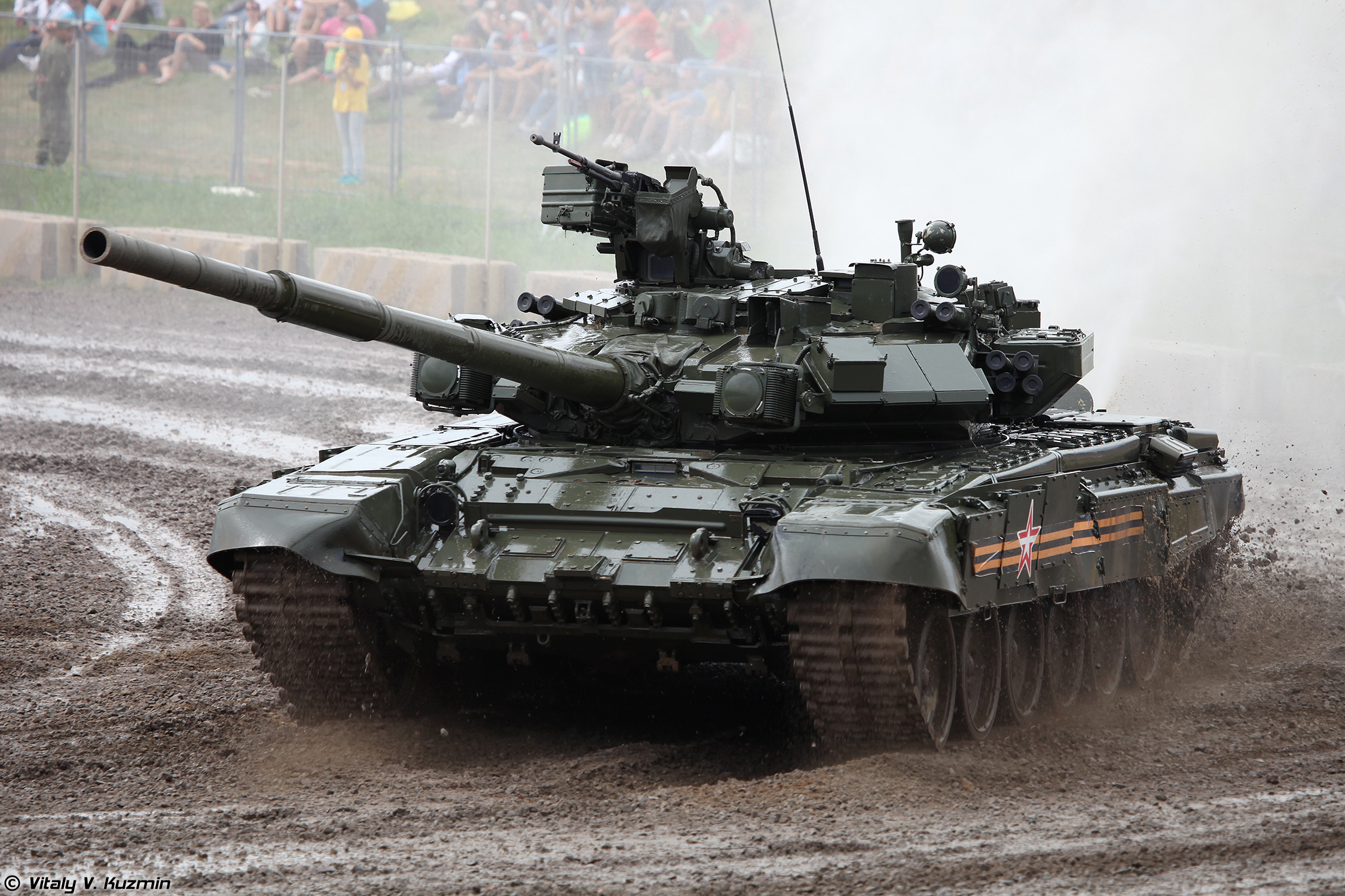 Xe tăng T-90A tại Oboronexpo 2014